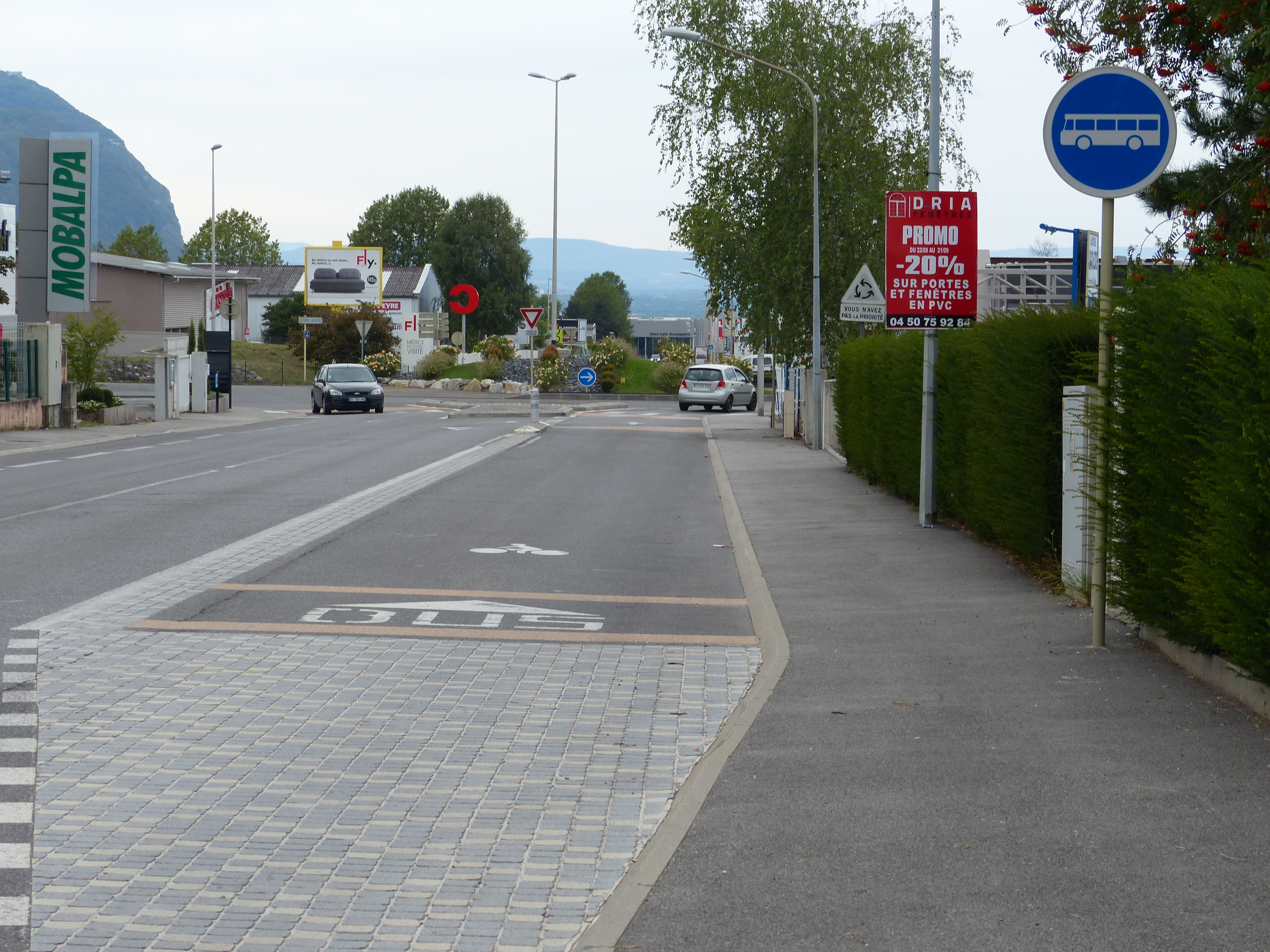 Panneau B27a au bord de la D150, à Ville-la-Grand, Haute-Savoie, France.